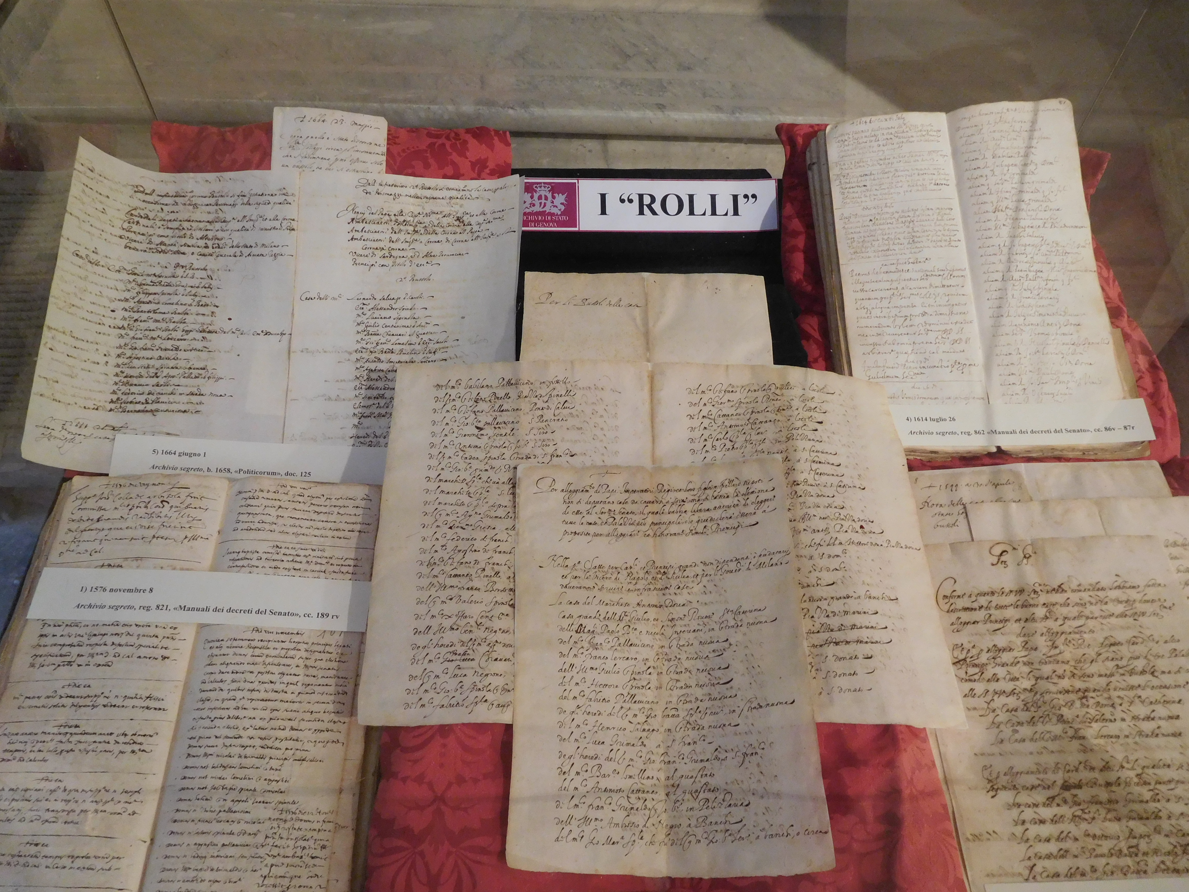 Esposizione dei 5 Rolli, ovvero gli elenchi dei Palazzi nobiliari, della Repubblica di Genova